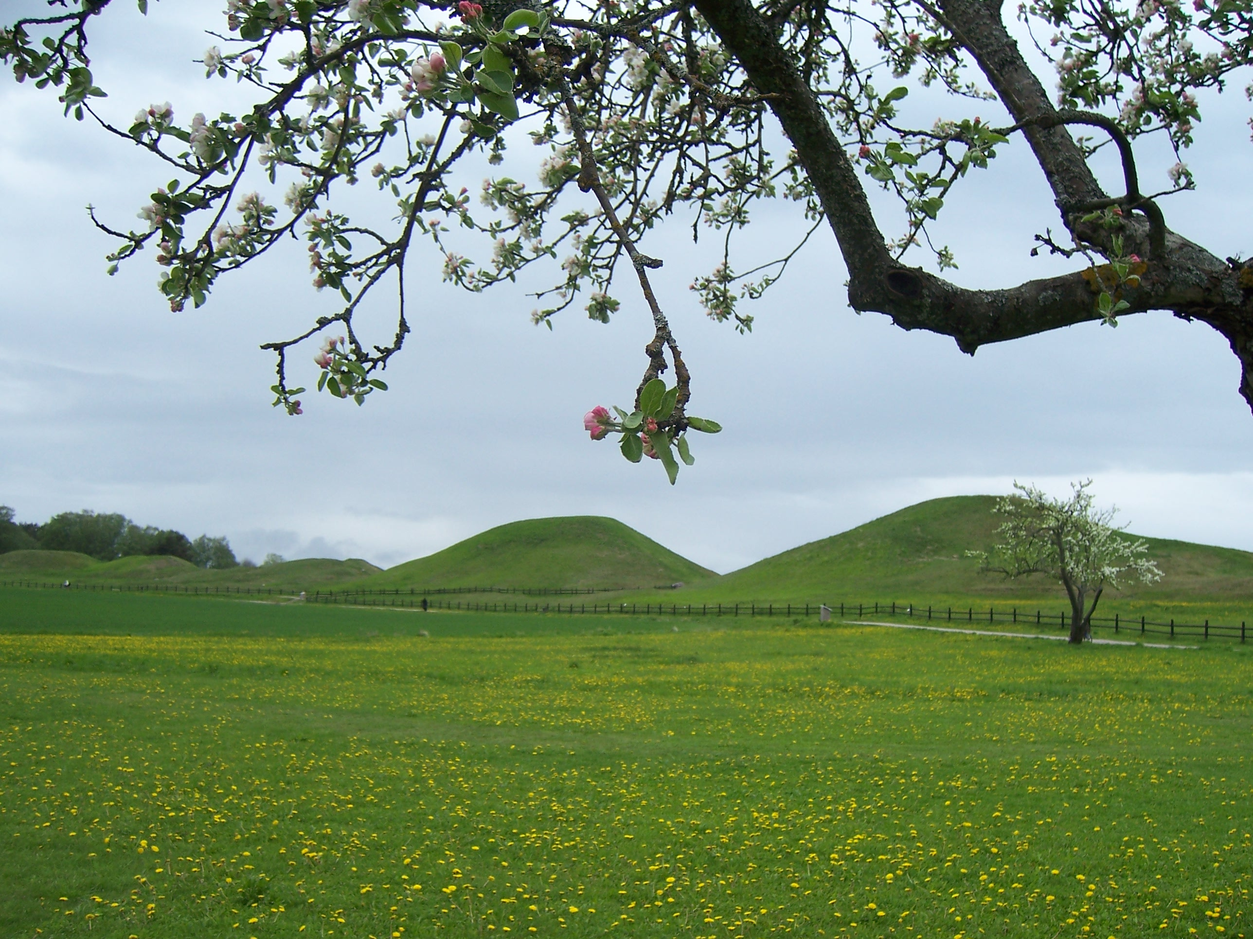 Vu des cumulus de Gammla Uppsala vus depuis le musée. En Mai 2006